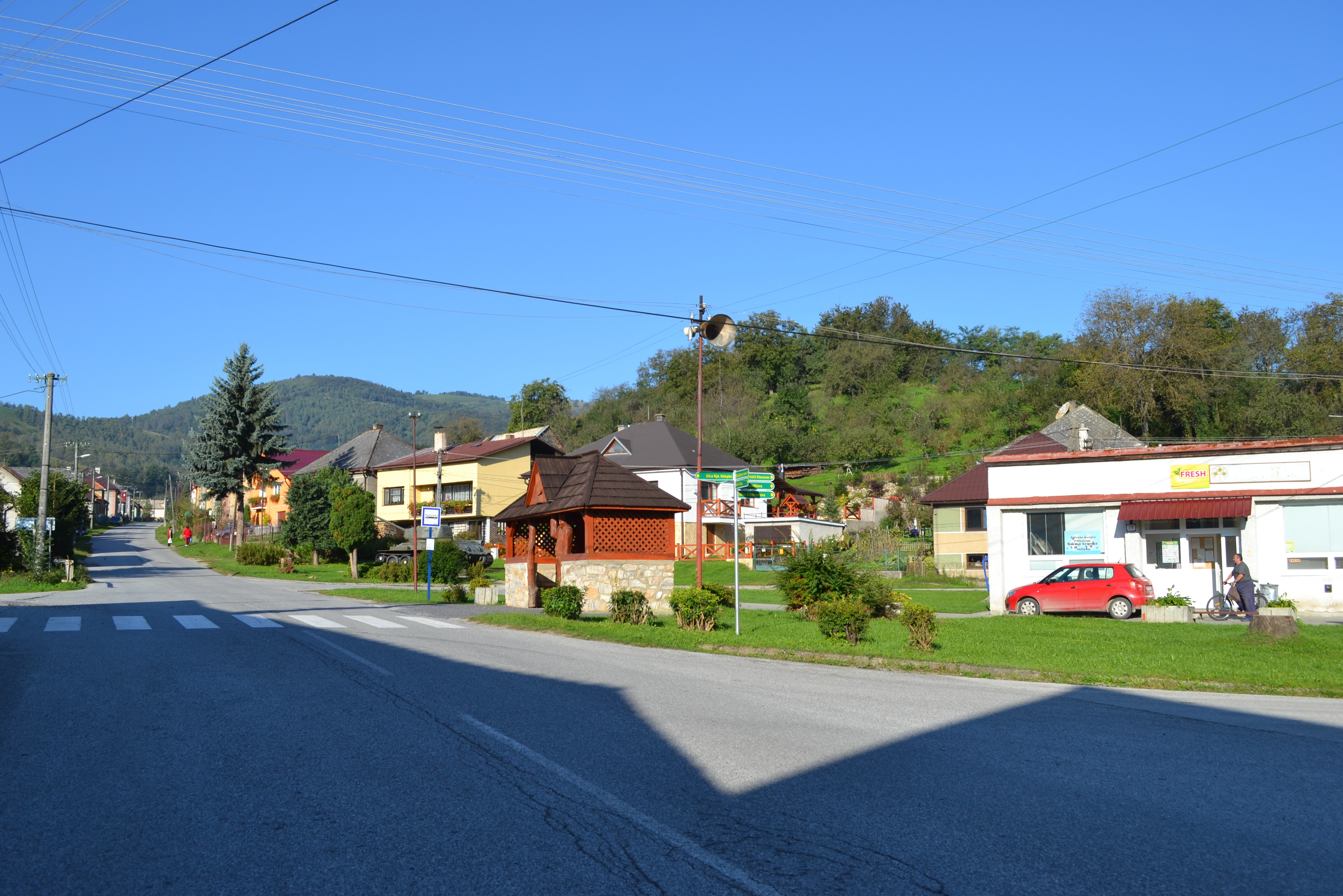 Ulica Obrancov mieru v Klenovci